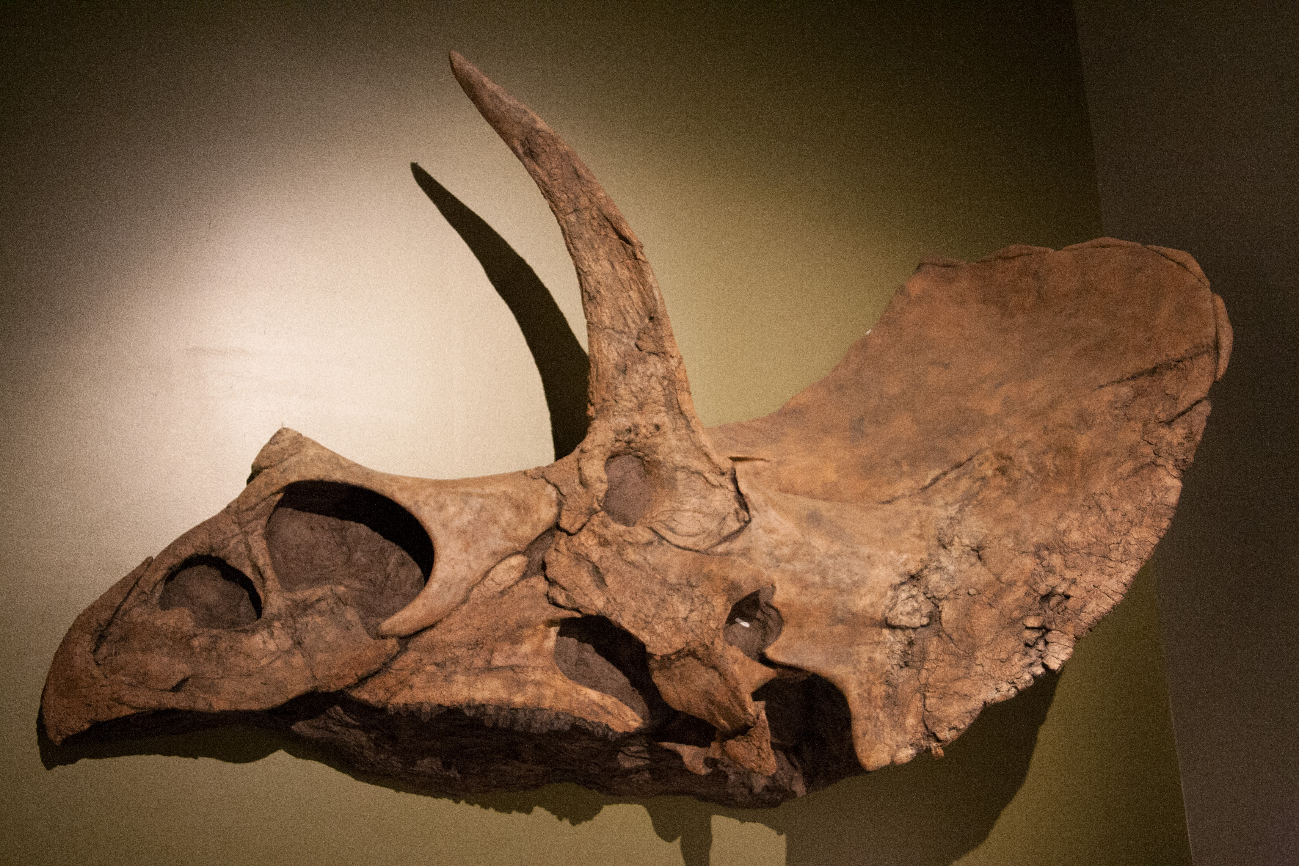 5d-dinosaur-camp-day2-20120802-60.jpg